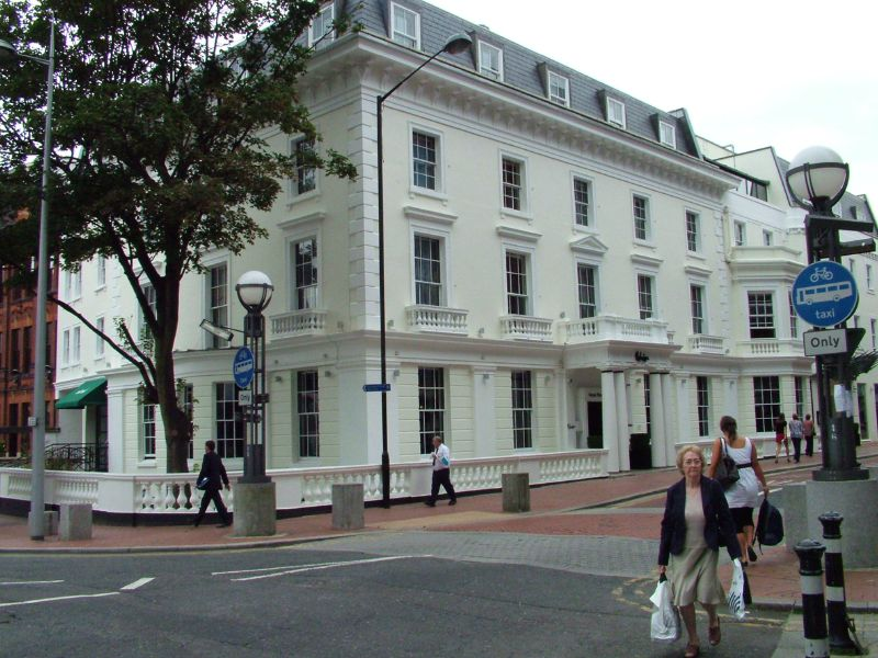 Malmaison Hotel 3; 2/8/07